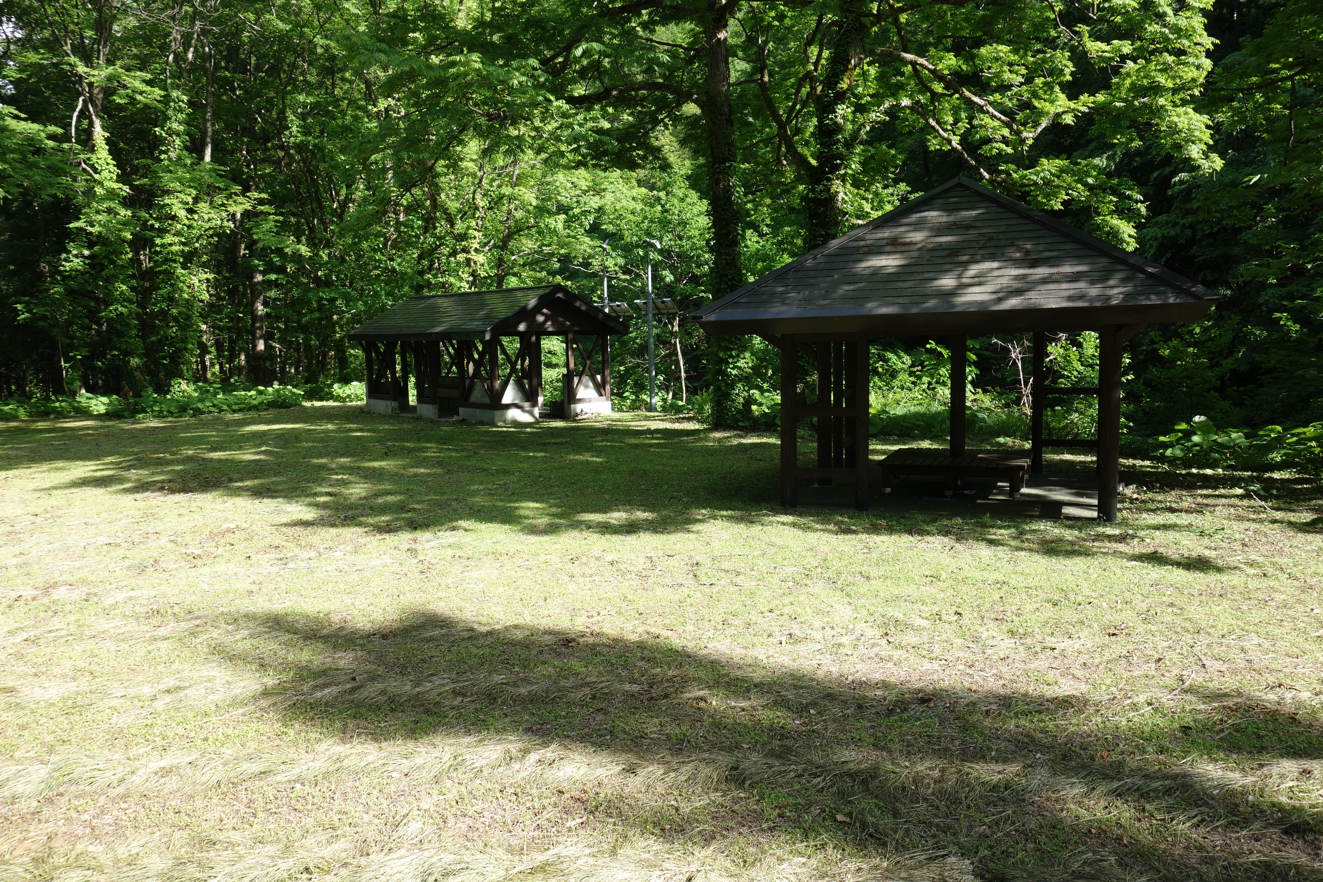 くるみ台キャンプ場